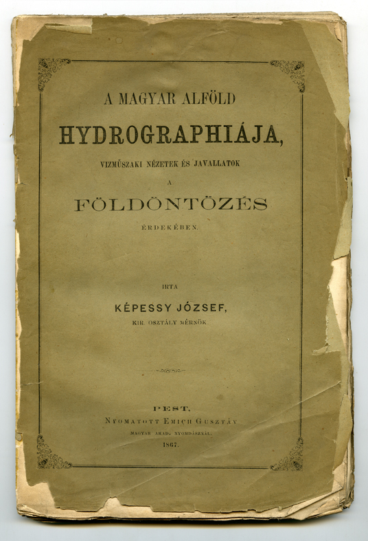 1 kepessyJozsef 03